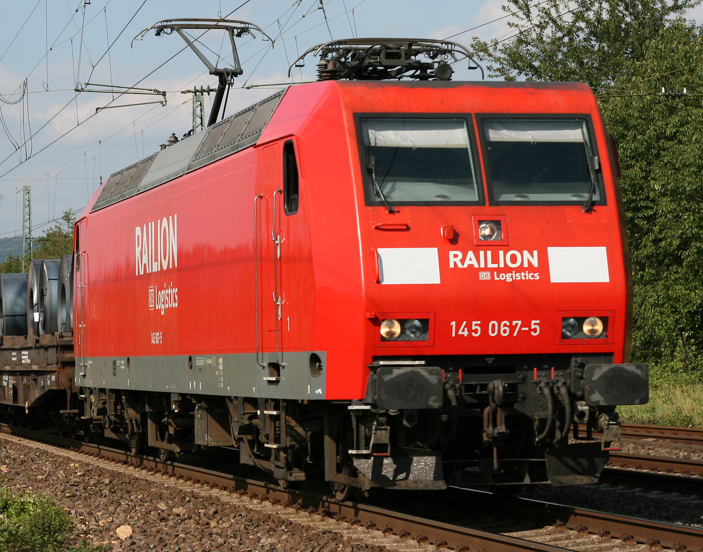 Die Lokomotive 145 067-5 der Baureihe 145 bei Unkel